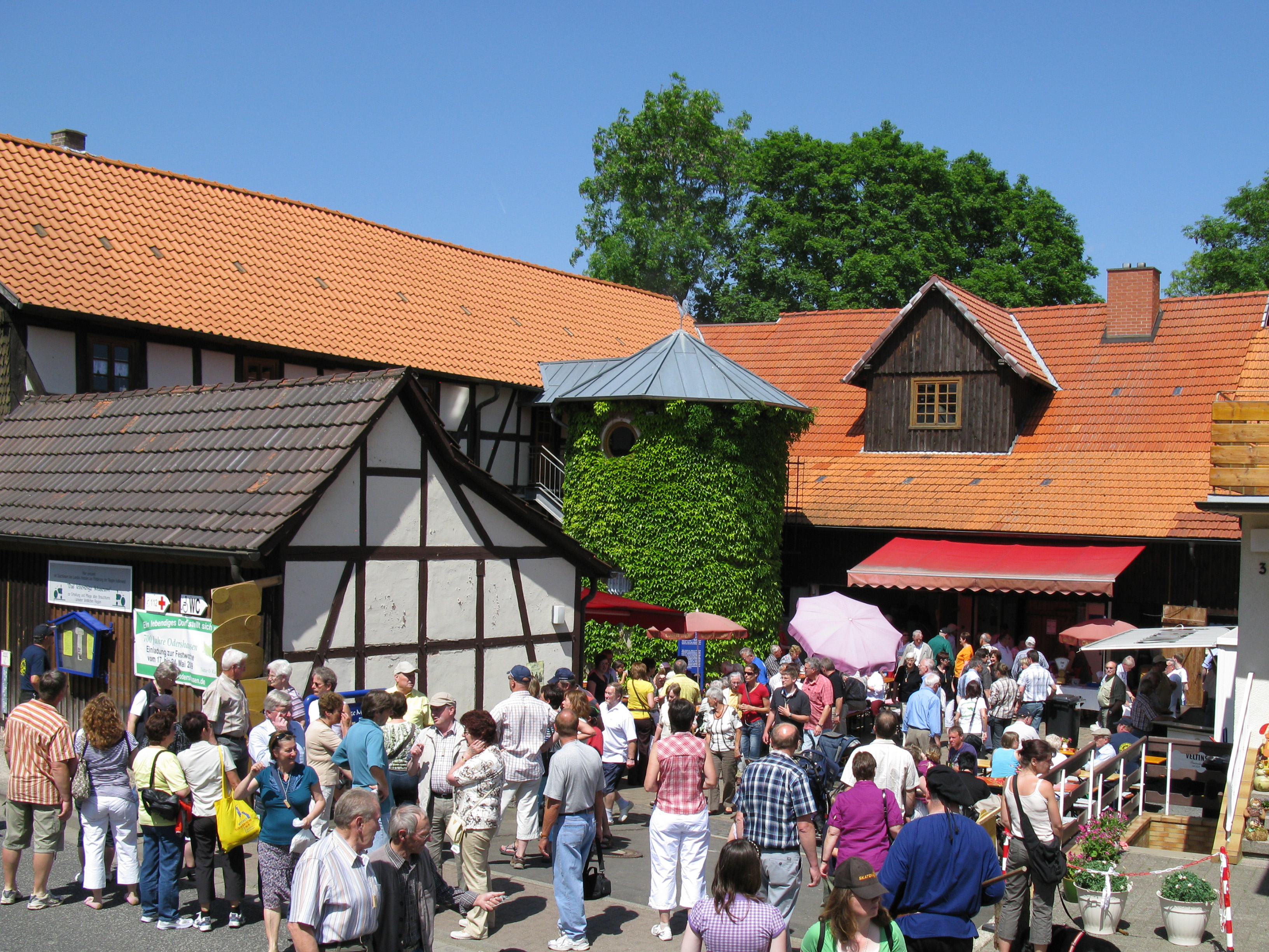 Hof des Museums beim Jubiläum 700 Jahre Odershausen